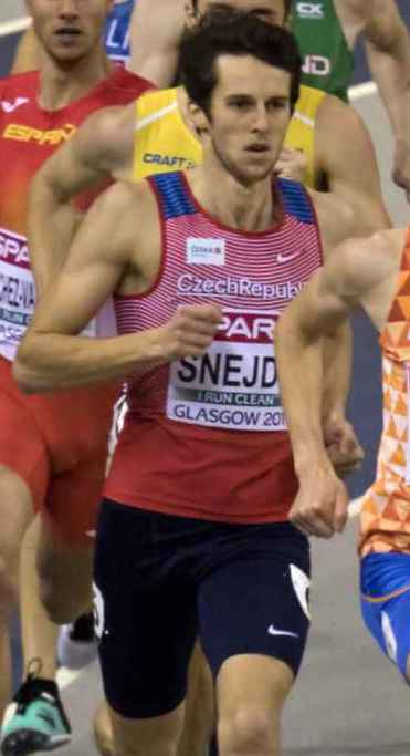 EKI10404 800m reeksen kupers